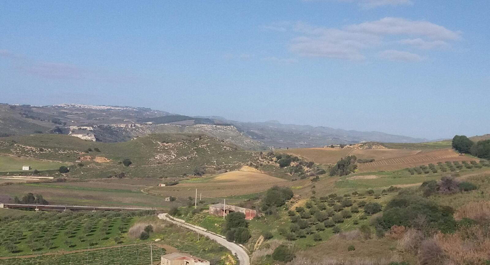 Vista dalla statale 115 del sito Montagnoli di Belìce, territorio di Menfi, sede antica di Inico